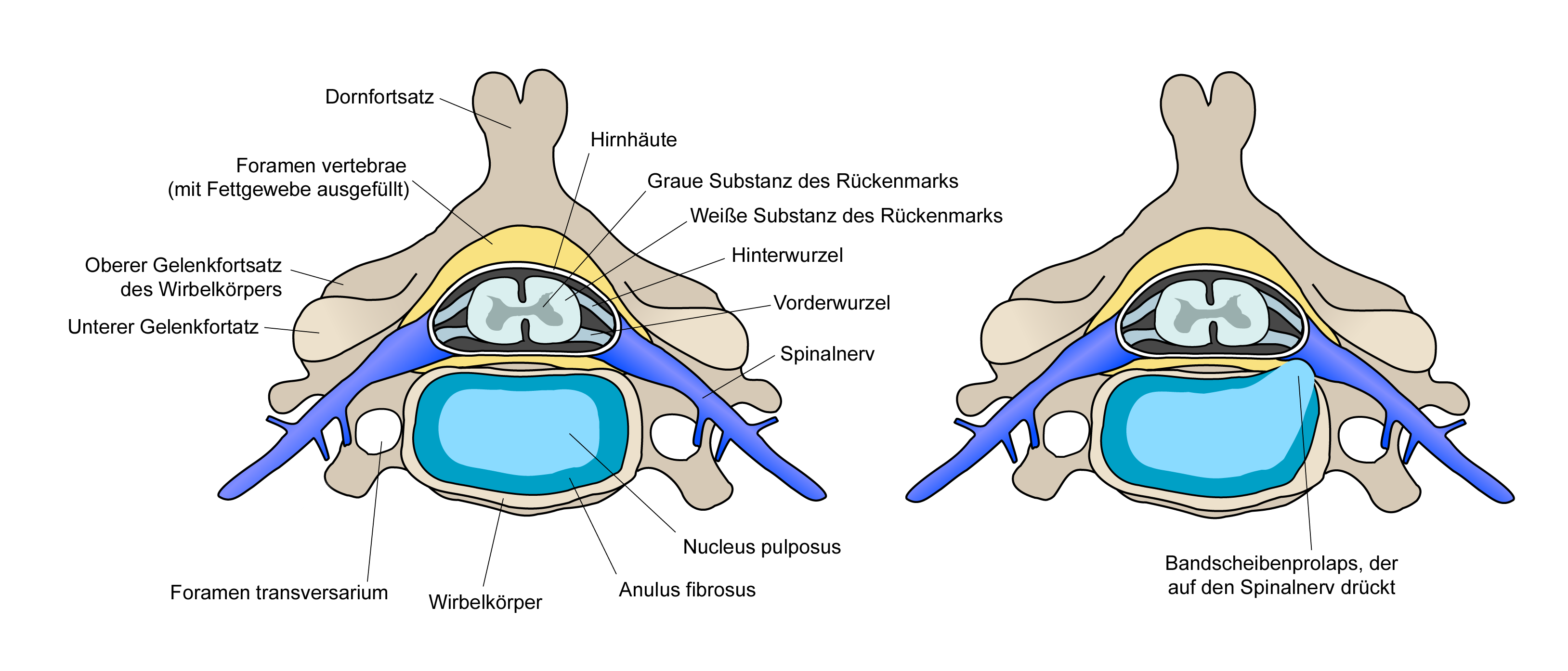 Schnitt durch die Strukturen der Wirbelsäule (links), Bandscheibenvorfall (rechts)